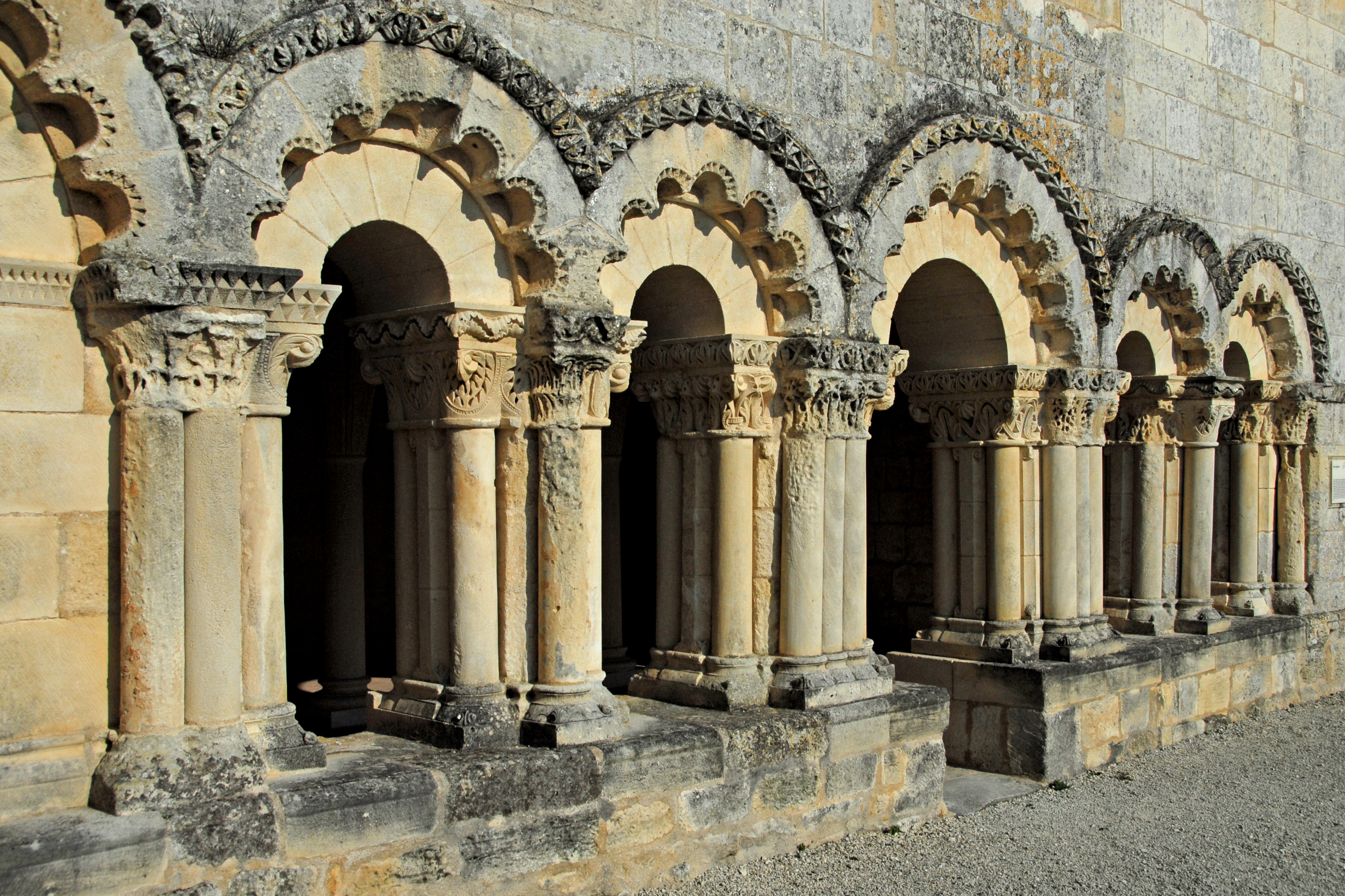 Abtei Trizay, Kapitelsaal v. West